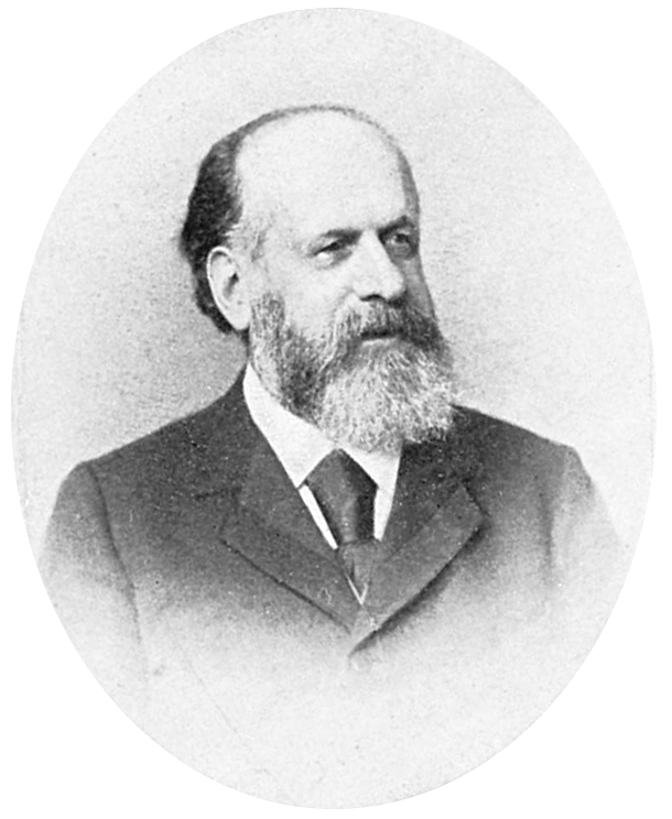 Direktor Friedrich Goldschmidt als Mitglied des Geschäftsführenden Ausschusses der Gewerbe-Ausstellung.